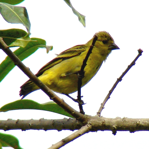 Hembra Description: Hooded siskin female (Carduelis magellanica) Creator: Luciano Carvalho Date: 21 de enero de 2008 (21-01-2008) Place: Brasil